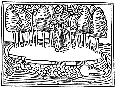 Woodcut from Medieval Dutch work De Reis van Sint Brandaan.